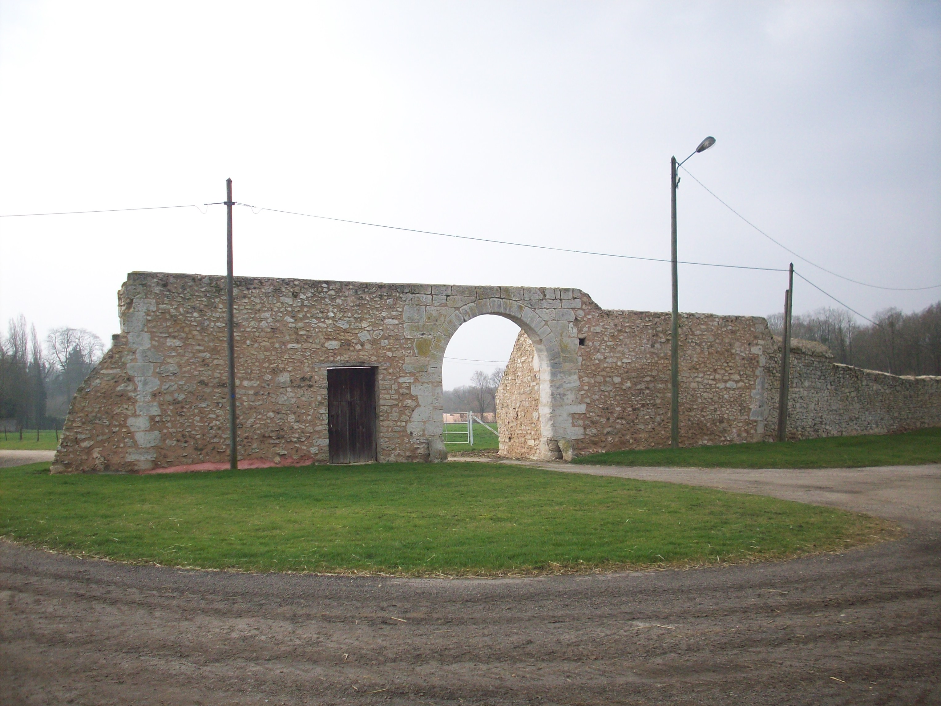 Porterie du prieuré de Saulseuse.